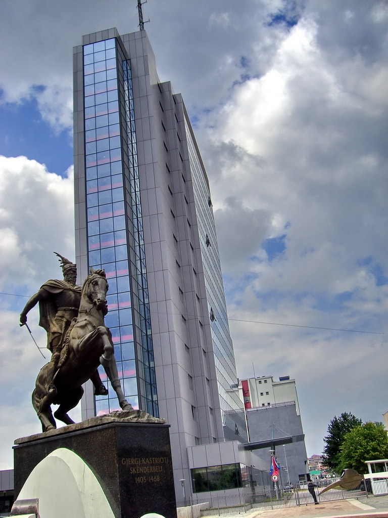 Skenderbeu & Qeveria